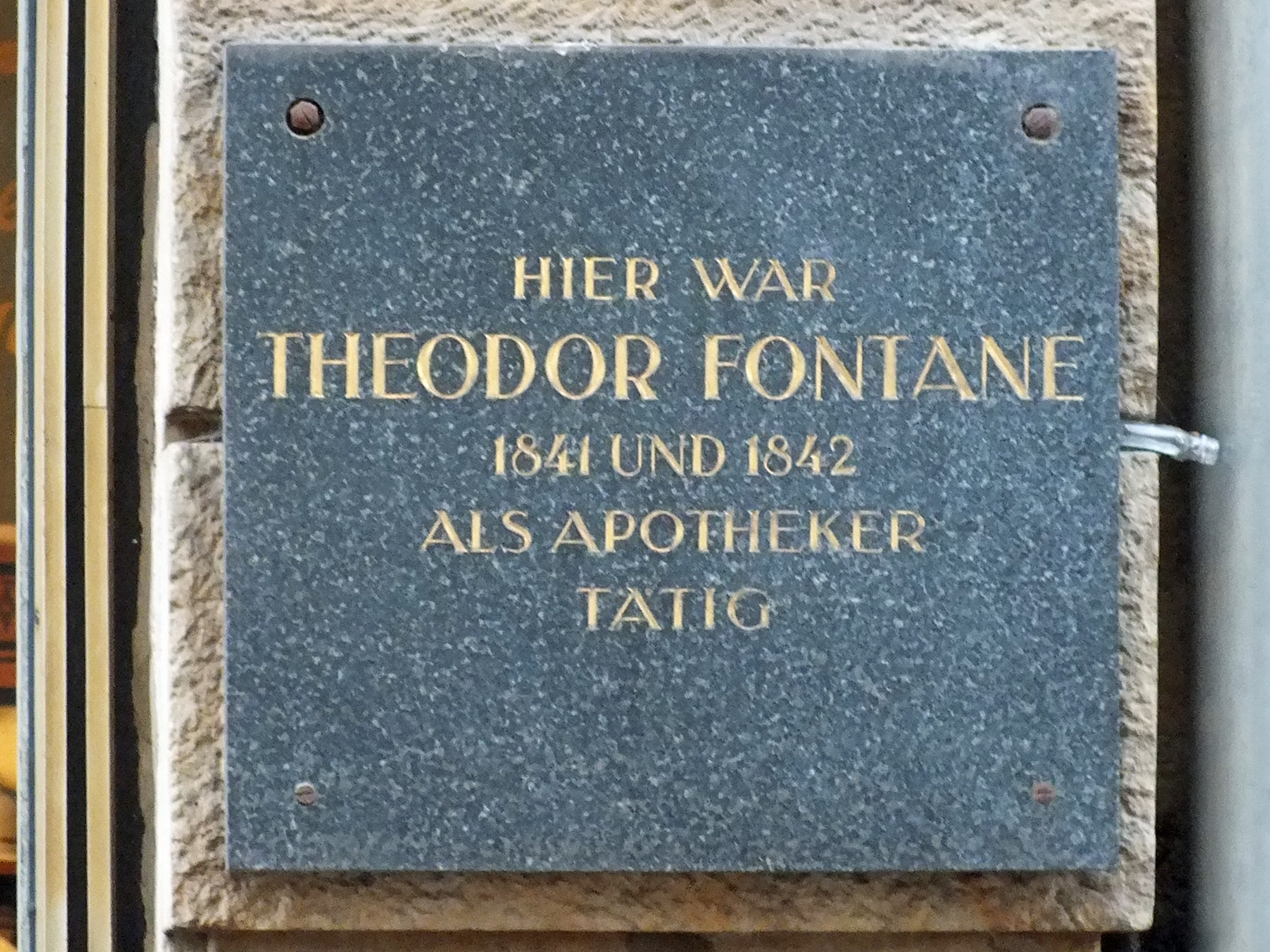 Die Erinnerungstafel für Theodor Fontane an der Adler-Apotheke in Leipzig